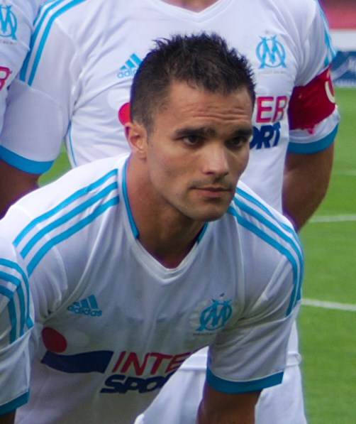 Jérémy Morel en 2013